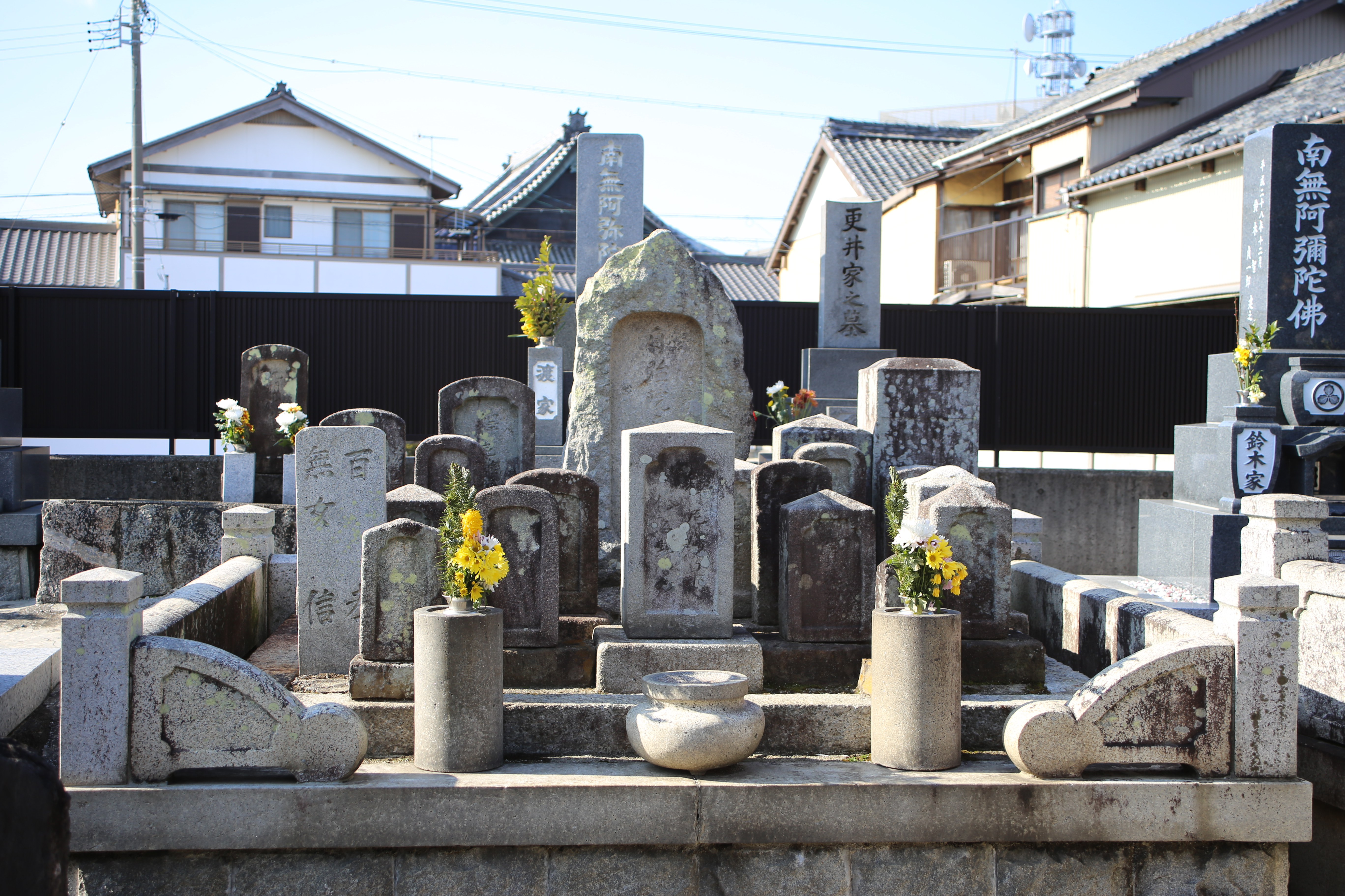 愛知県田原市田原町の竜泉寺墓地